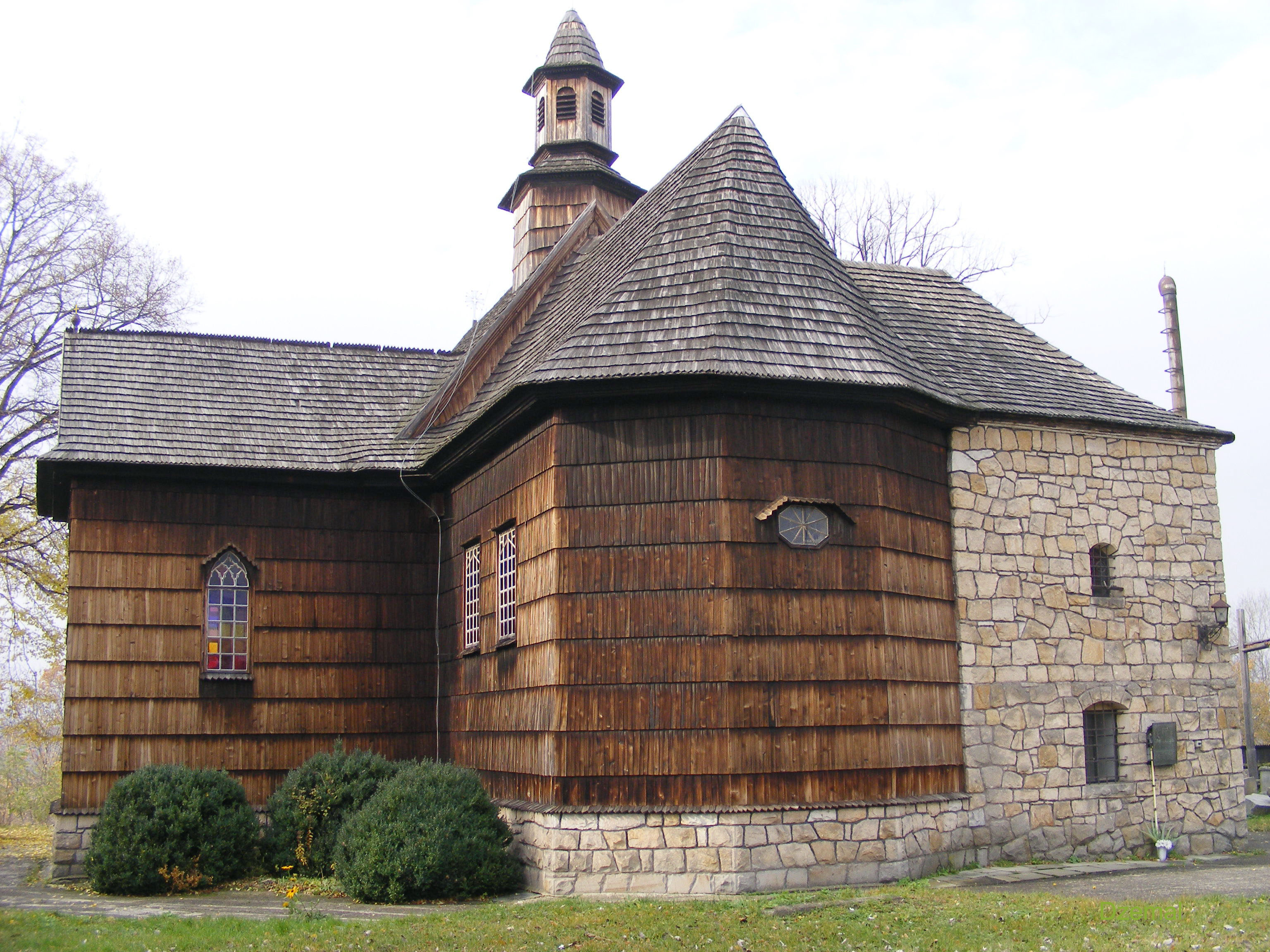 Kościół we Wrocance